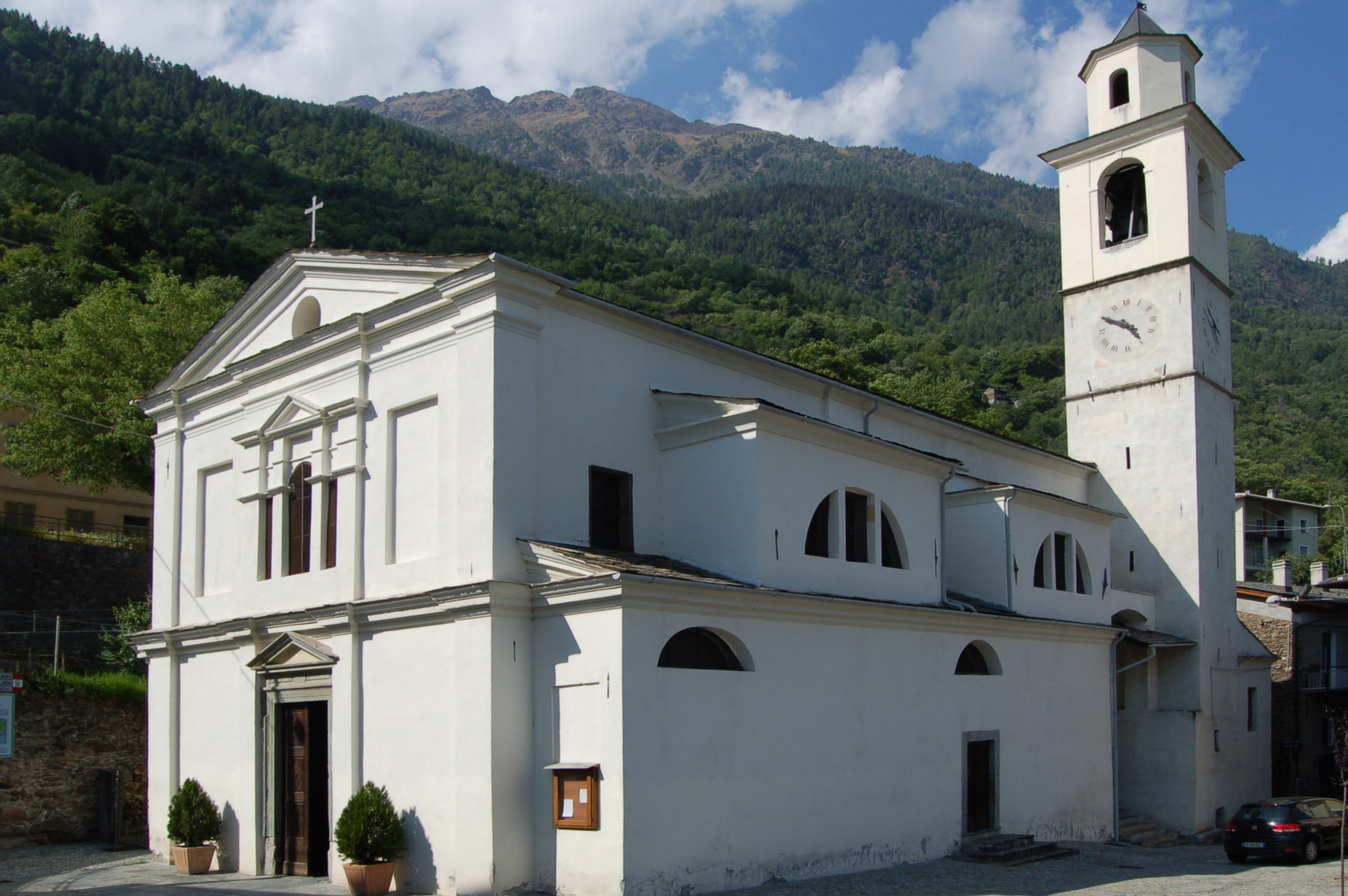 Chiesa di San Pietro Martire a Baruffini, frazione del comune di Tirano